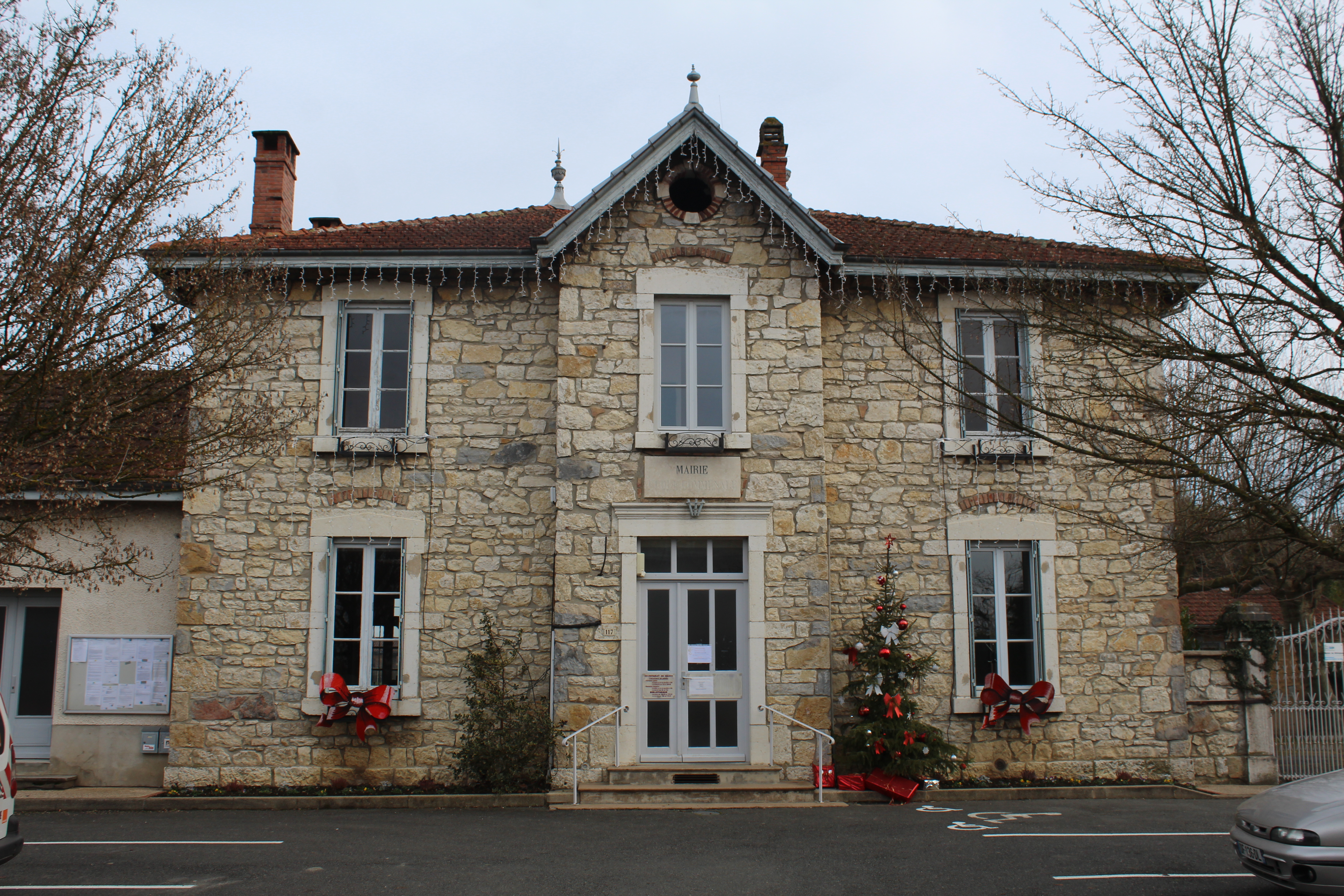 Mairie de Condeissiat.